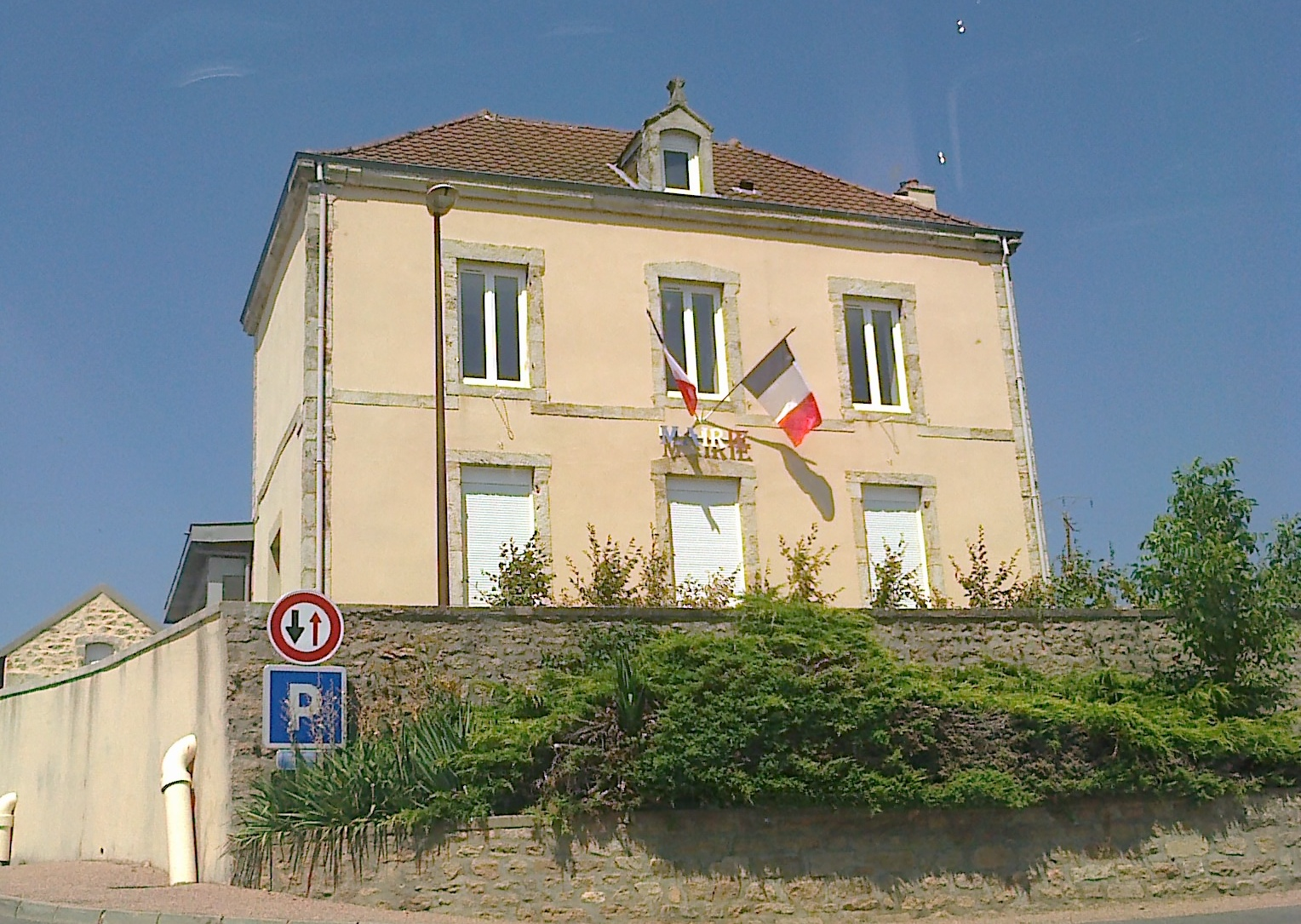 Mairie de Saint-Firmin